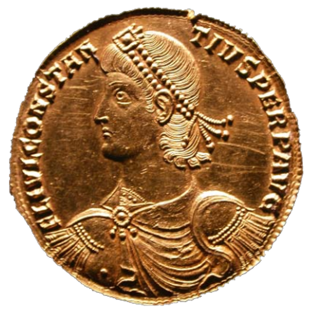 Deutschland (D) - Baden-Württemberg (BW) - Landkreis Konstanz (KN) - Eigeltingen, Römischer Gutshof von Homberg: Außerhalb der Hofmauer wurde in den 1930er Jahren dieses Goldmultiplum gefunden. Die Vorderseite zeigt die Büste des Constantius II., Sohn Konstantins des Großen und nach dessen Tod ab 337 Kaiser im Osten des Römischen Reiches sowie ab 353 Kaiser des gesamten Römischen Reiches. Auf der Rückseite ist Tyche, in der griechischen Mythologie die Göttin des Schicksals, dargestellt.